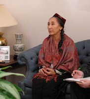 Рабия Кадыр, президент ВУК. Photo is taken in Рабия Кадыр